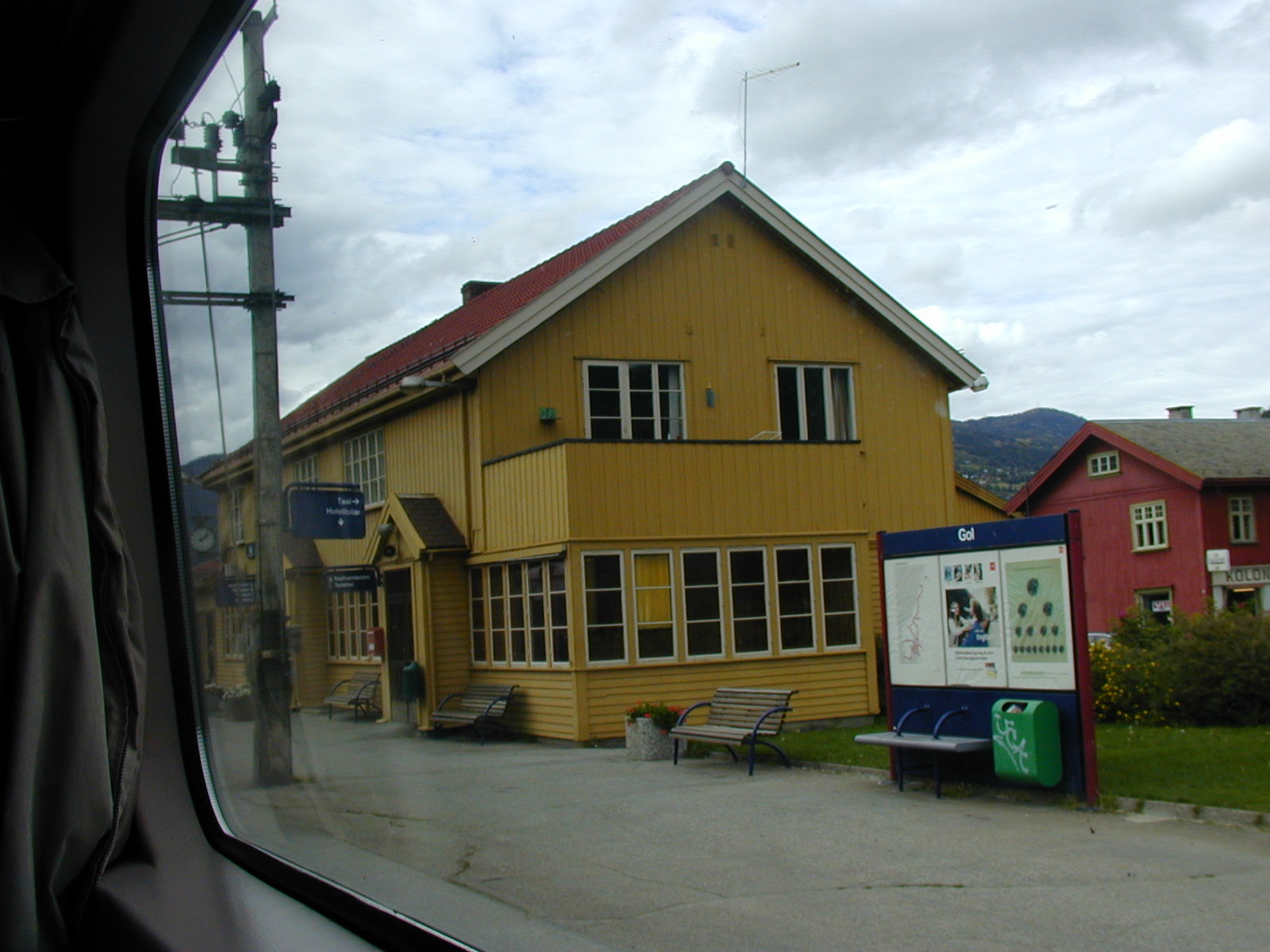 Gol stasjon på Bergensbanen